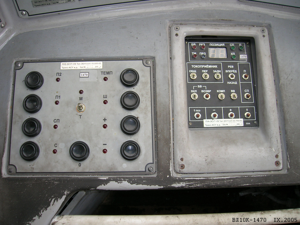 Кнопочный контроллер ПУ2 и панель аварийного управления ПУА, электровоз ВЛ10К-1470 модернизации Челябинского электровозоремонтного завода (ЧЭРЗ)